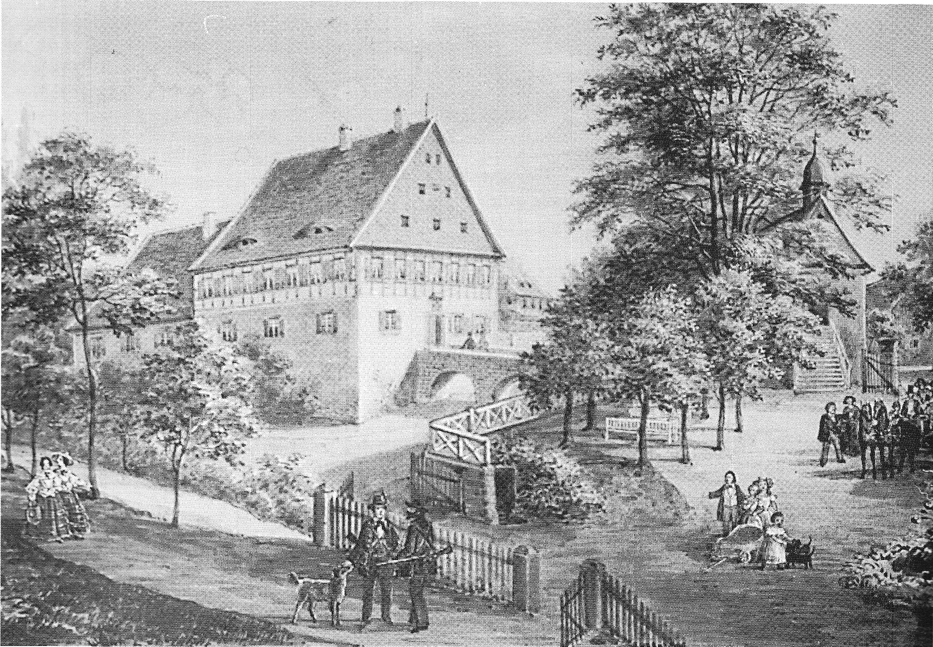 Zeichnung des Schloss Ebneth aus dem Jahr 1815